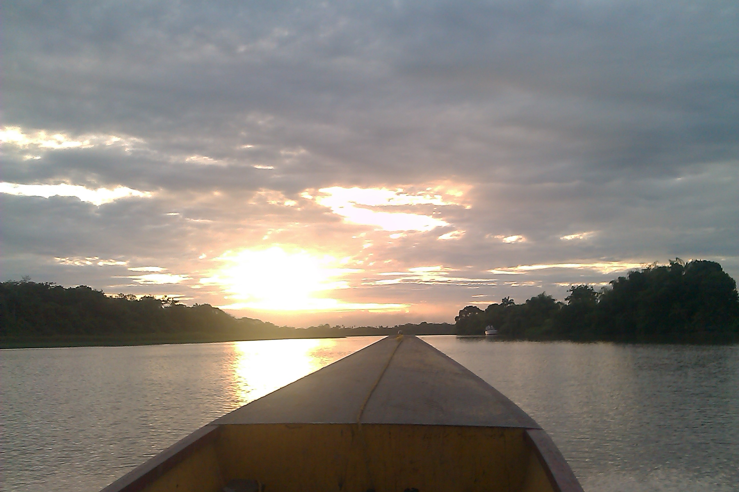 Rio Orinoco, Atardecer Deltano, Tucupita Estado Delta Amacuro